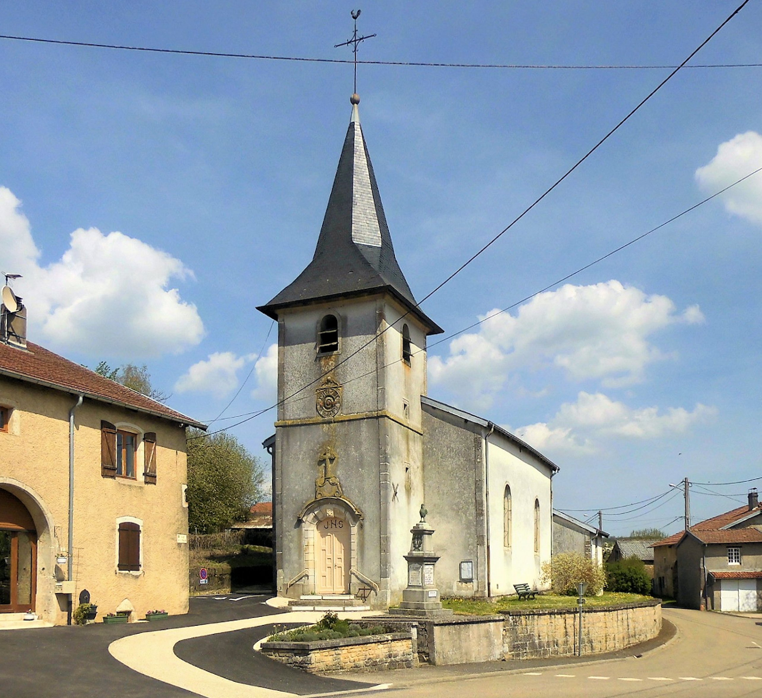 L'église Saint-Martin de Maconcourt